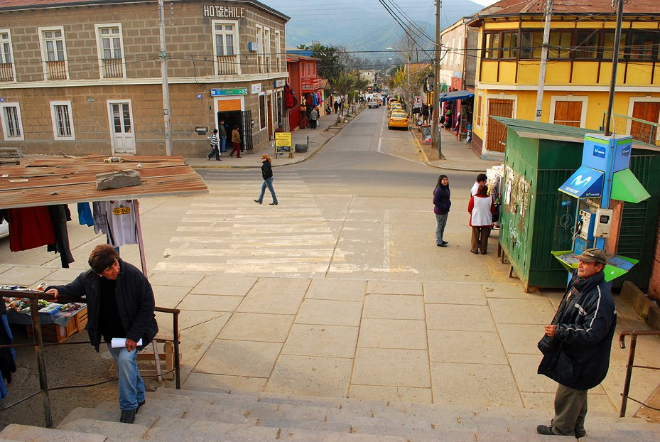 tomada desde la escalera de la ex-estacion de trenes